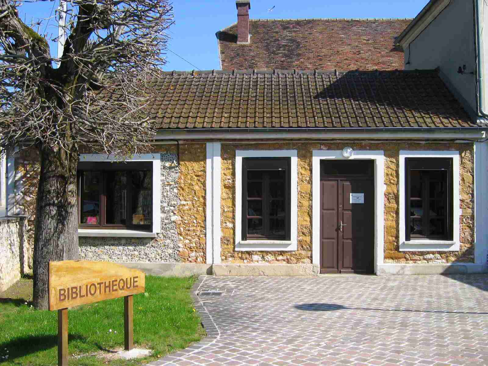 Bibliothèque de Voisenon (77)